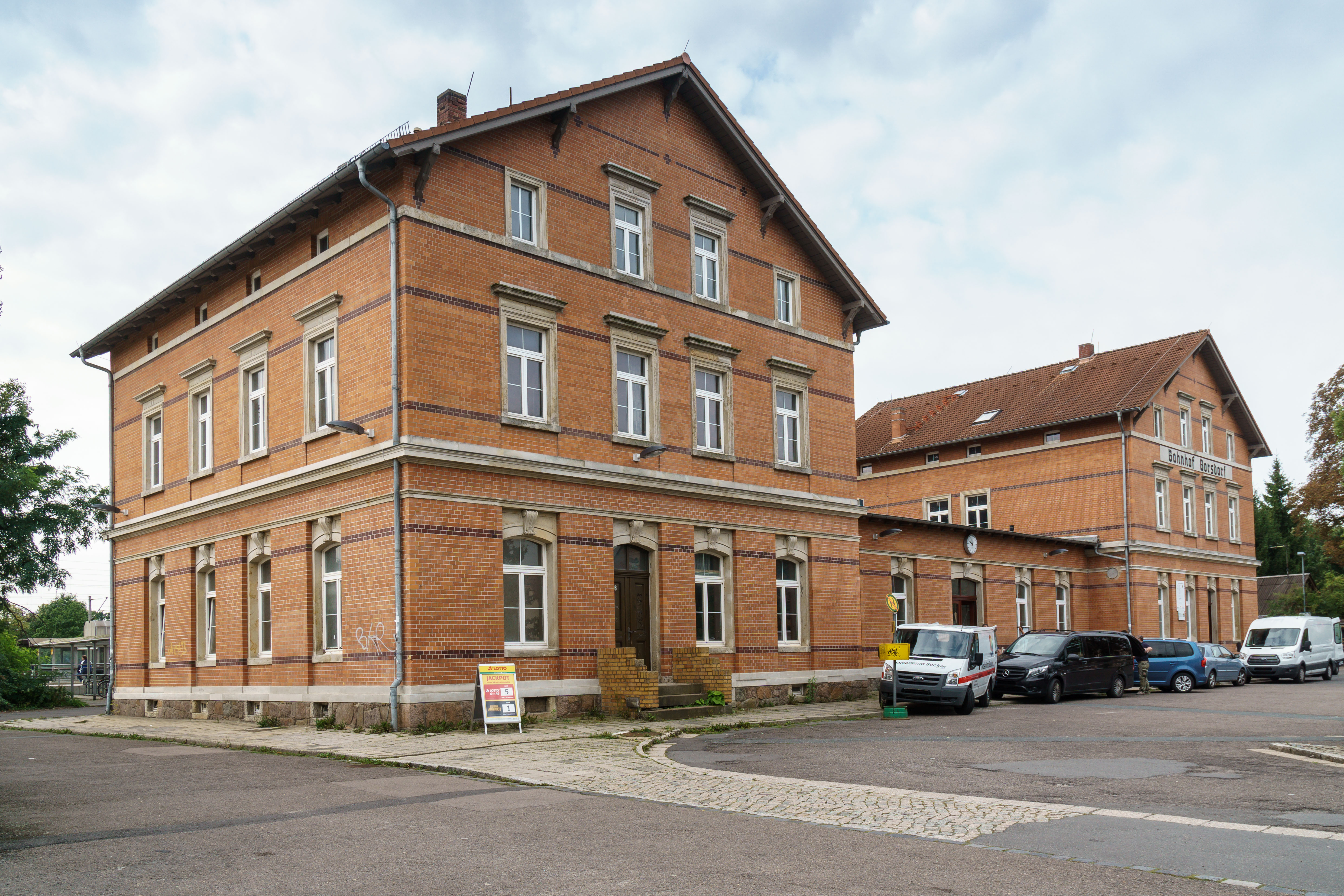 Empfangsgebäude des Bahnhofs, Bahnhofstraße 16 in Borsdorf. Bemerkung: Knotenpunkt der Bahnstrecken Leipzig-Dresden sowie Borsdorf-Coswig.